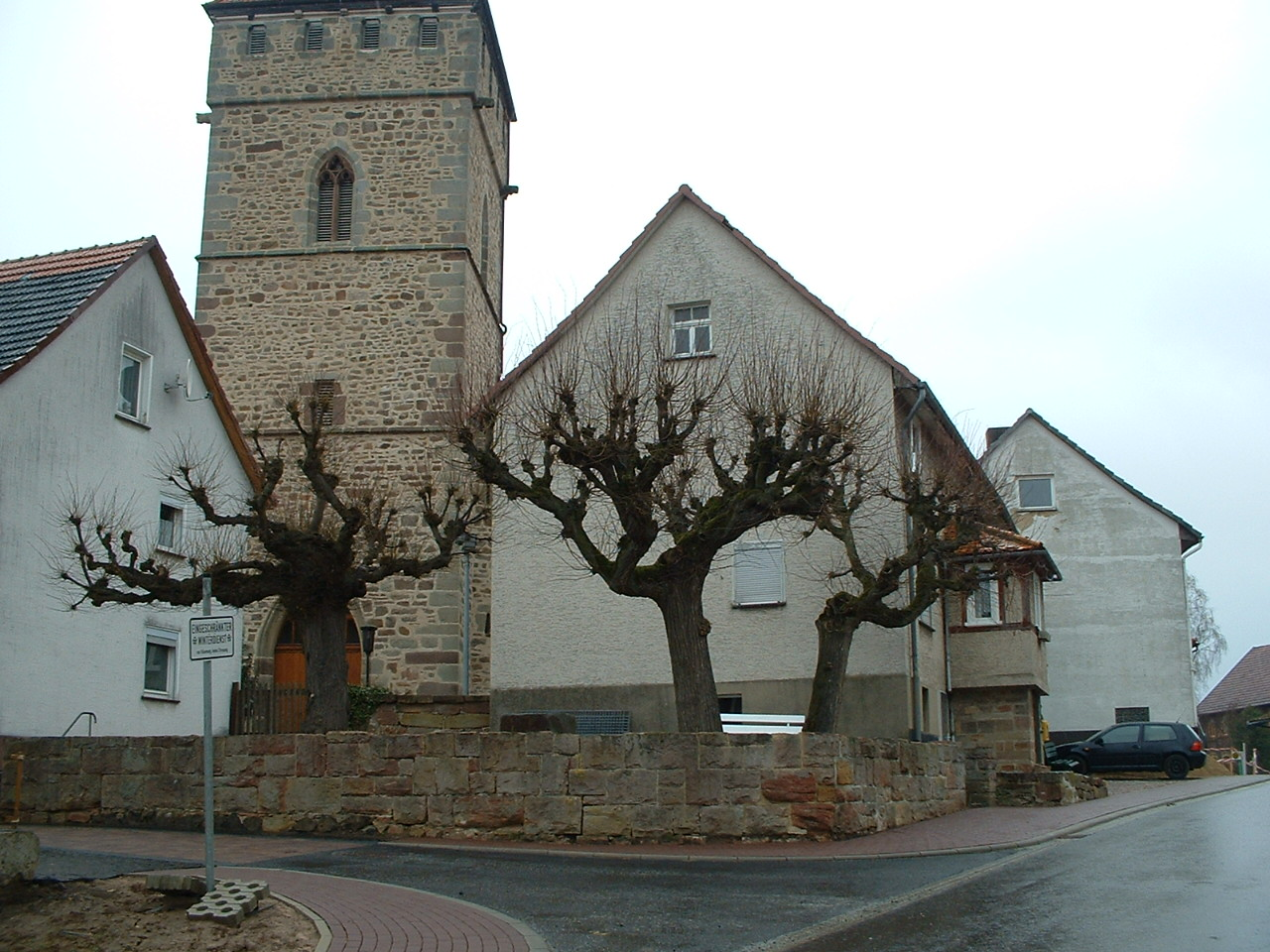 Dagobertshausen besitzt drei geleitete Linden